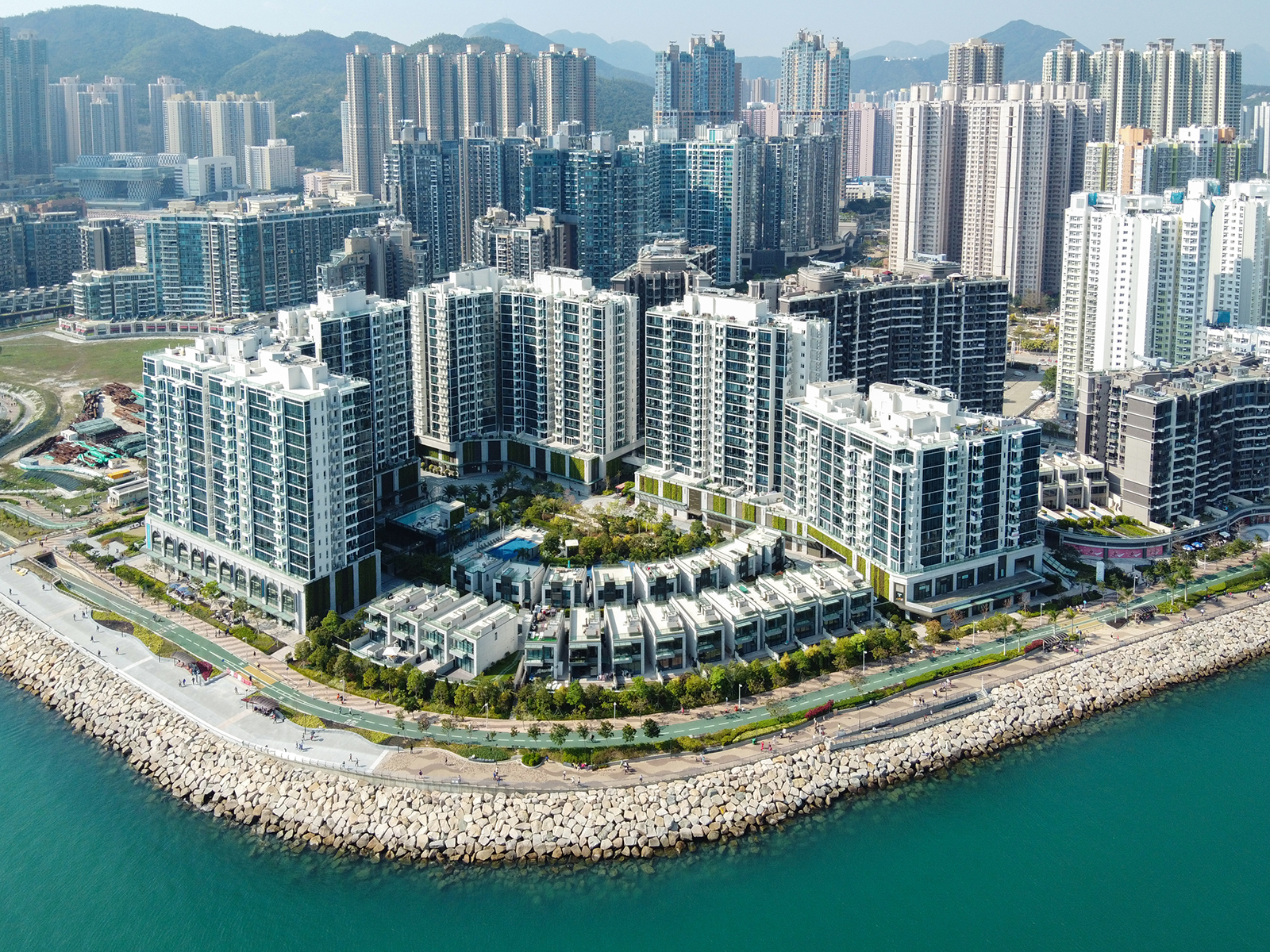 MONTEREY